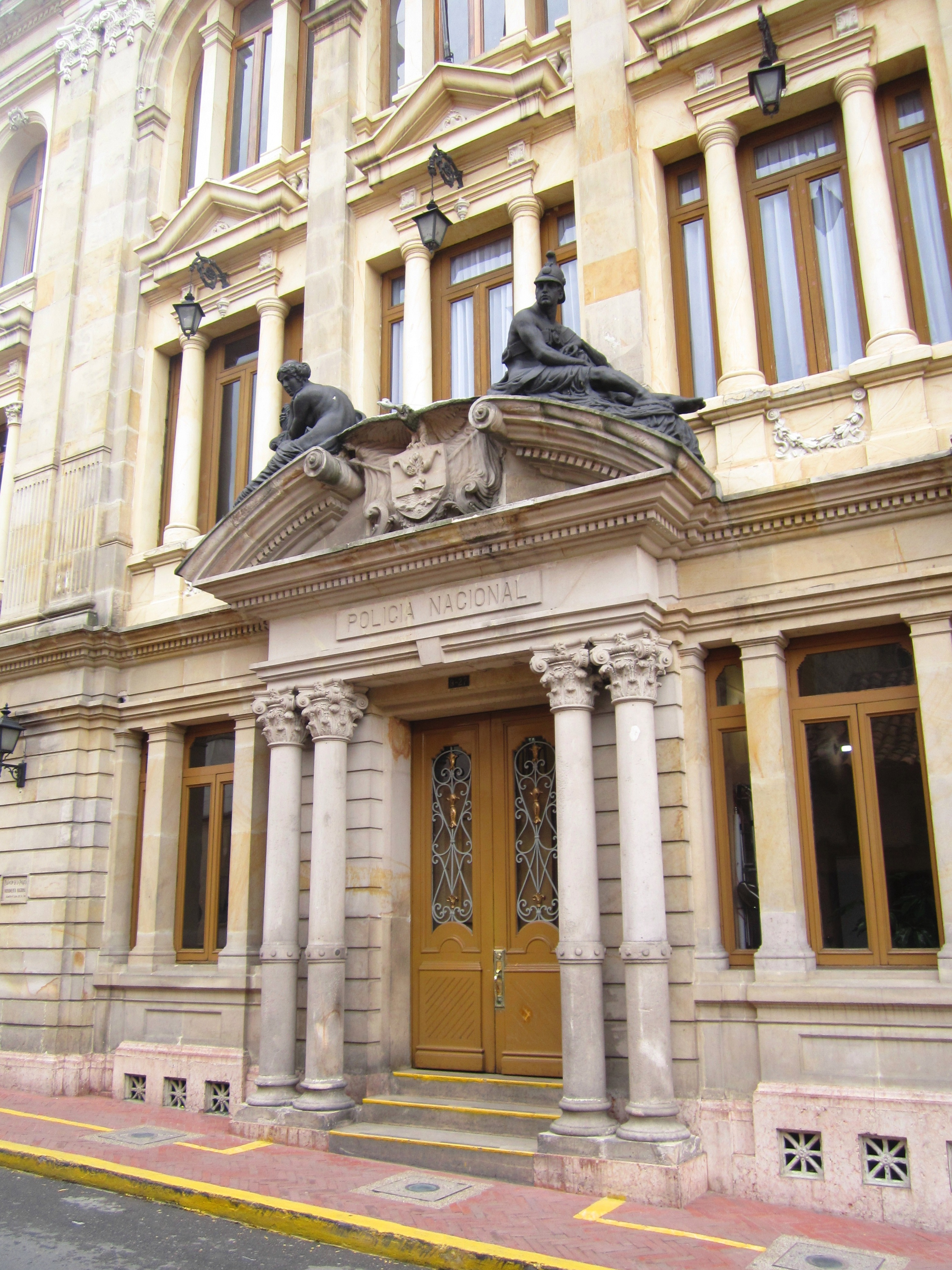 Bogotá, localidad de La Candelaria, Museo de la Policía, carrera Novena con calle Novena.